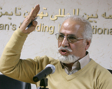 مهدر آذرسینا در نشست بررسی موسیقی رسانه در خبرگزاری مهر ۲۷ بهمن ۱۳۸۶